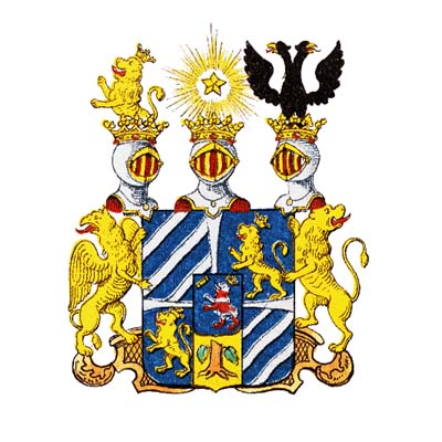 Wappen der Grafen von Hessenstein, Bastardlinie des schwedischen Königs Königs Friedrich (Friedrich von Hessen-Kassel, 1720-1751) und seiner offiziellen Mätresse, der Gräfin Hedvig Ulrika Taube; 1741 zu Grafen von Hessenstein ernannt